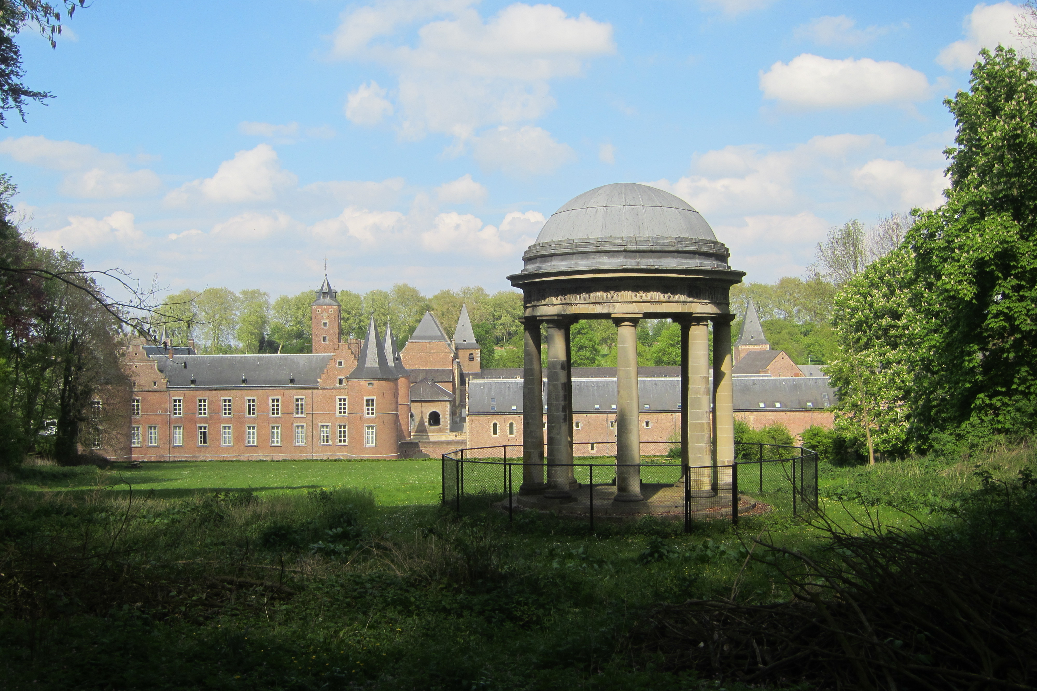 Zuidzicht Landcommanderij Alden Biesen met Minervatempel